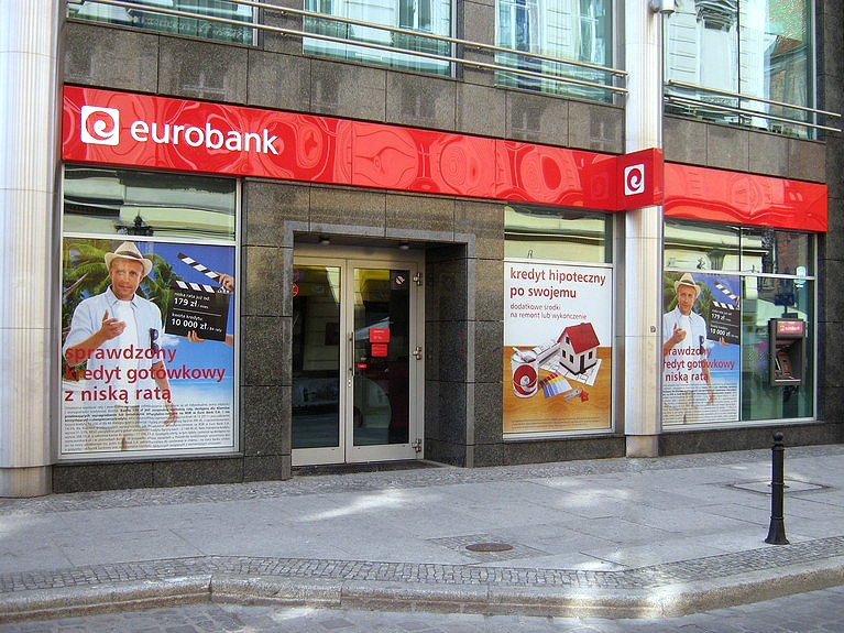 placówka eurobanku we Wrocławiu